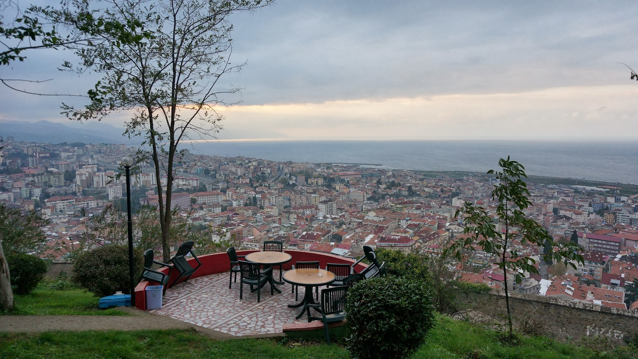 Trabzon, Trabzon Merkez/Trabzon, Turkey